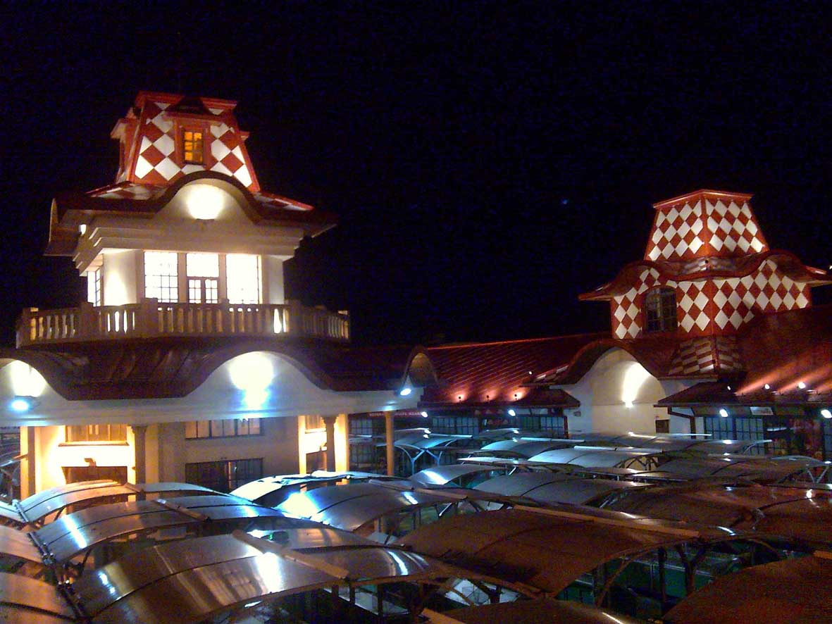 Aca Srbin je autor. Nocna slika pijace na Zelenom Vencu